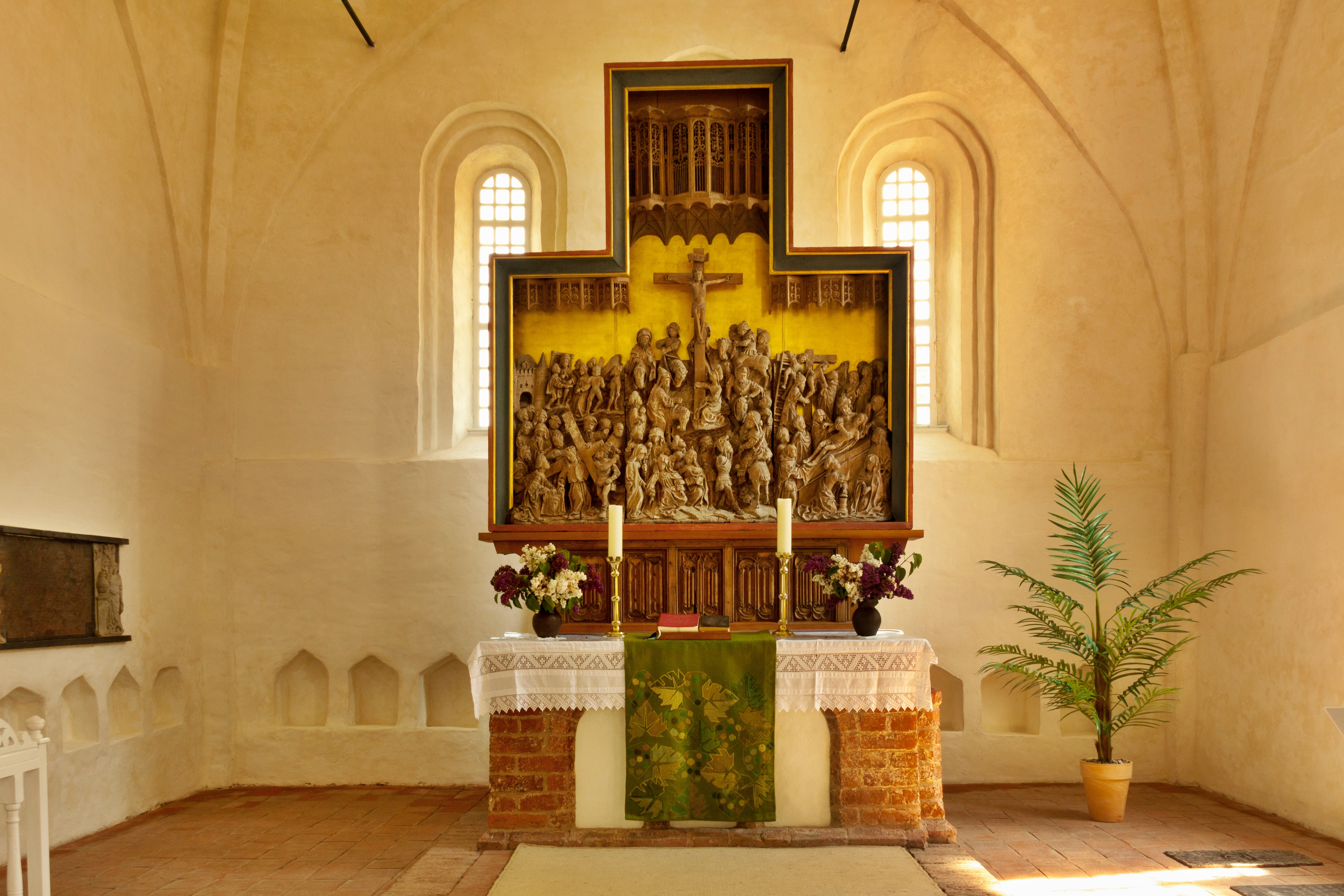 Der Altar der Loquarder Kirche